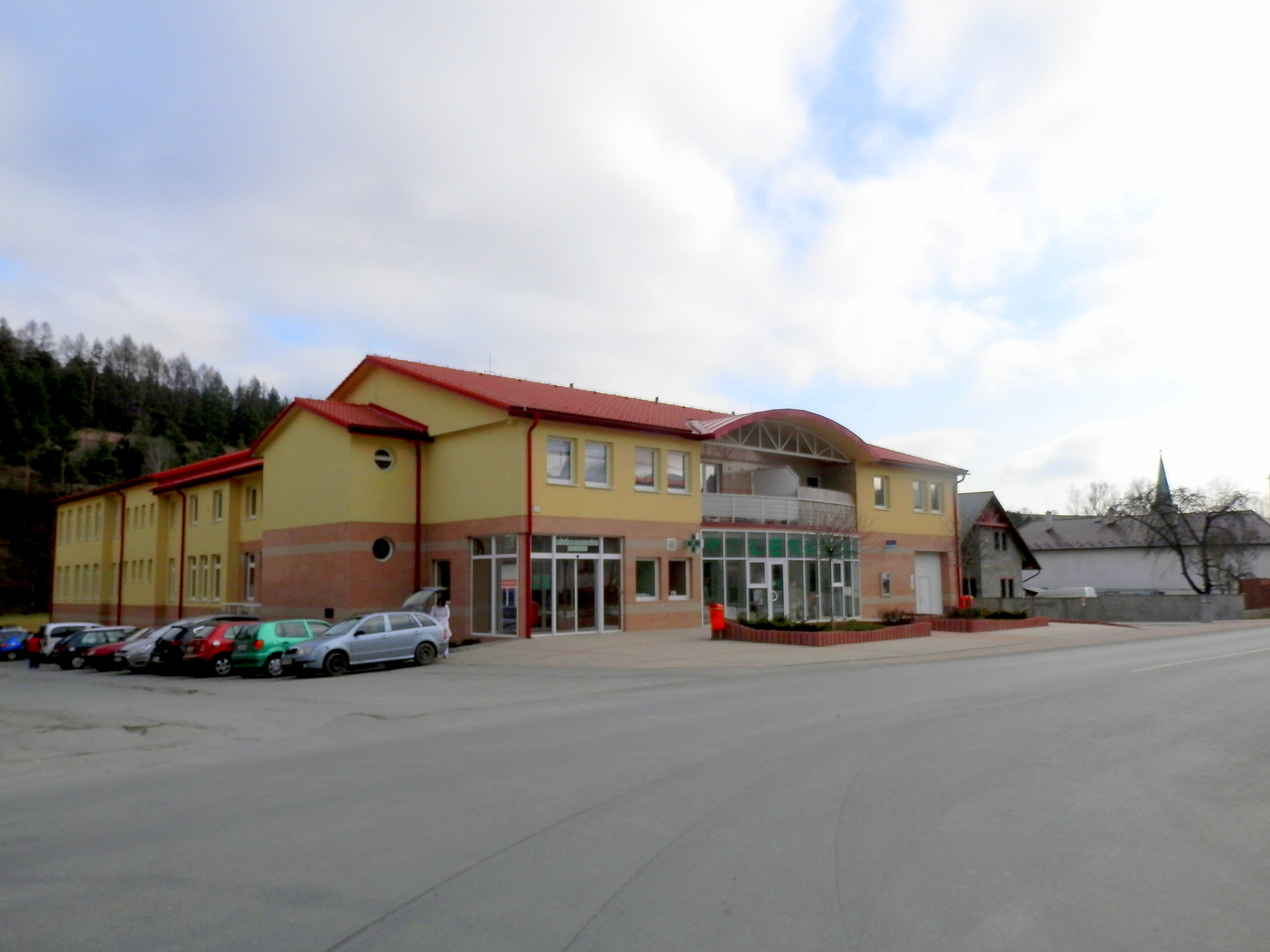 Nové budovy.. Obec Široké okres Prešov.